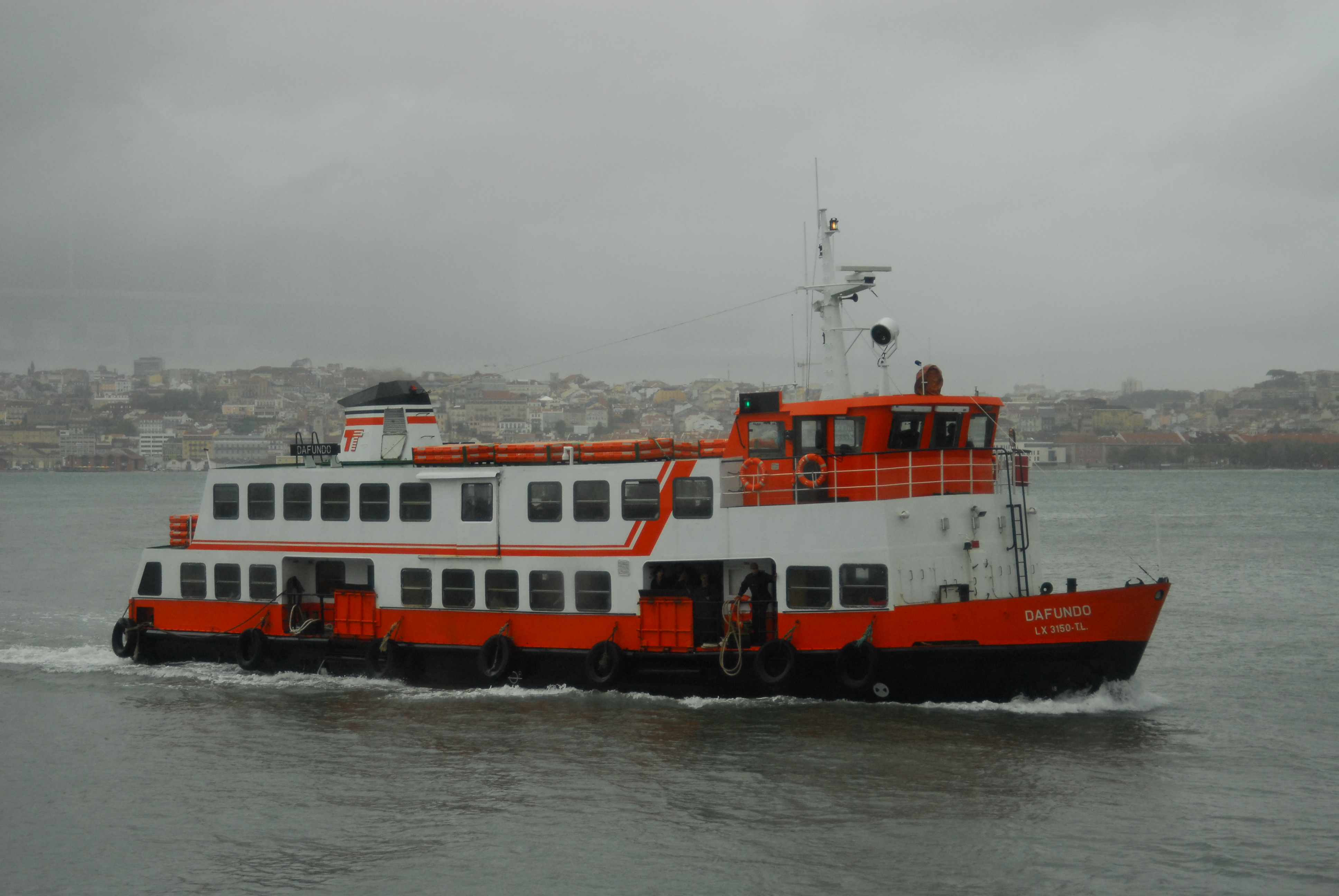 Cacilheiro Dafundo a atravessar o Tejo a 8 de Abril de 2008.